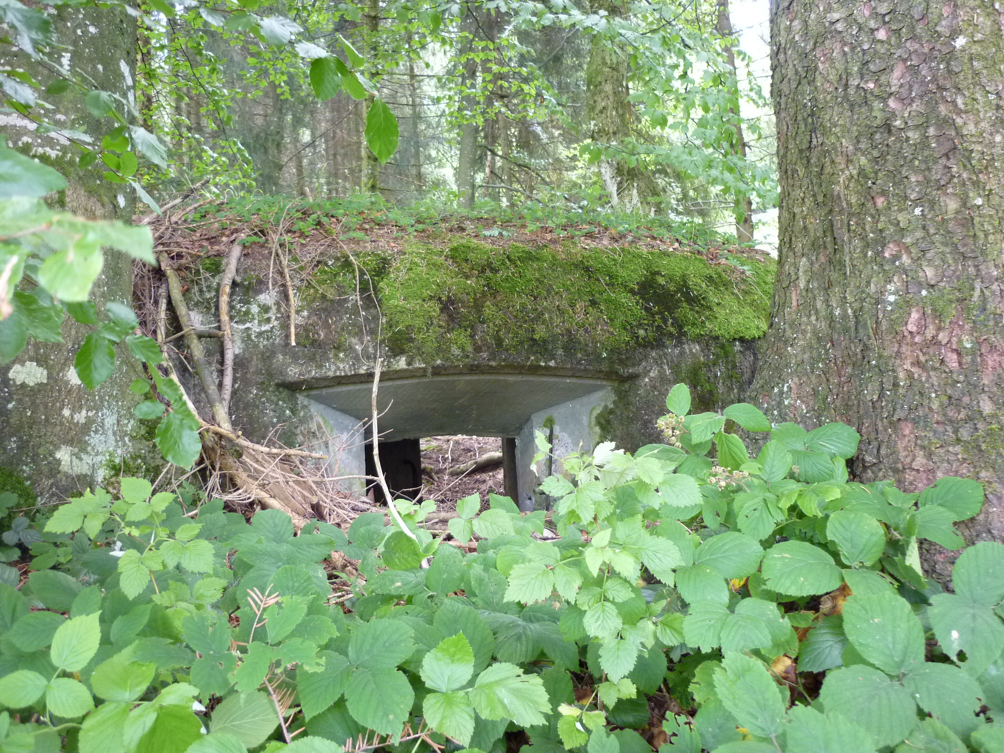 Bunker Schurtannen, Menzingen ZG, Schweiz : Tankbüchsenstand Schurtannenweid A 7232